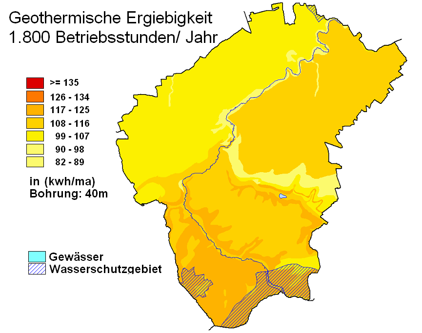 geothermische Karte Büren (Westfalen)